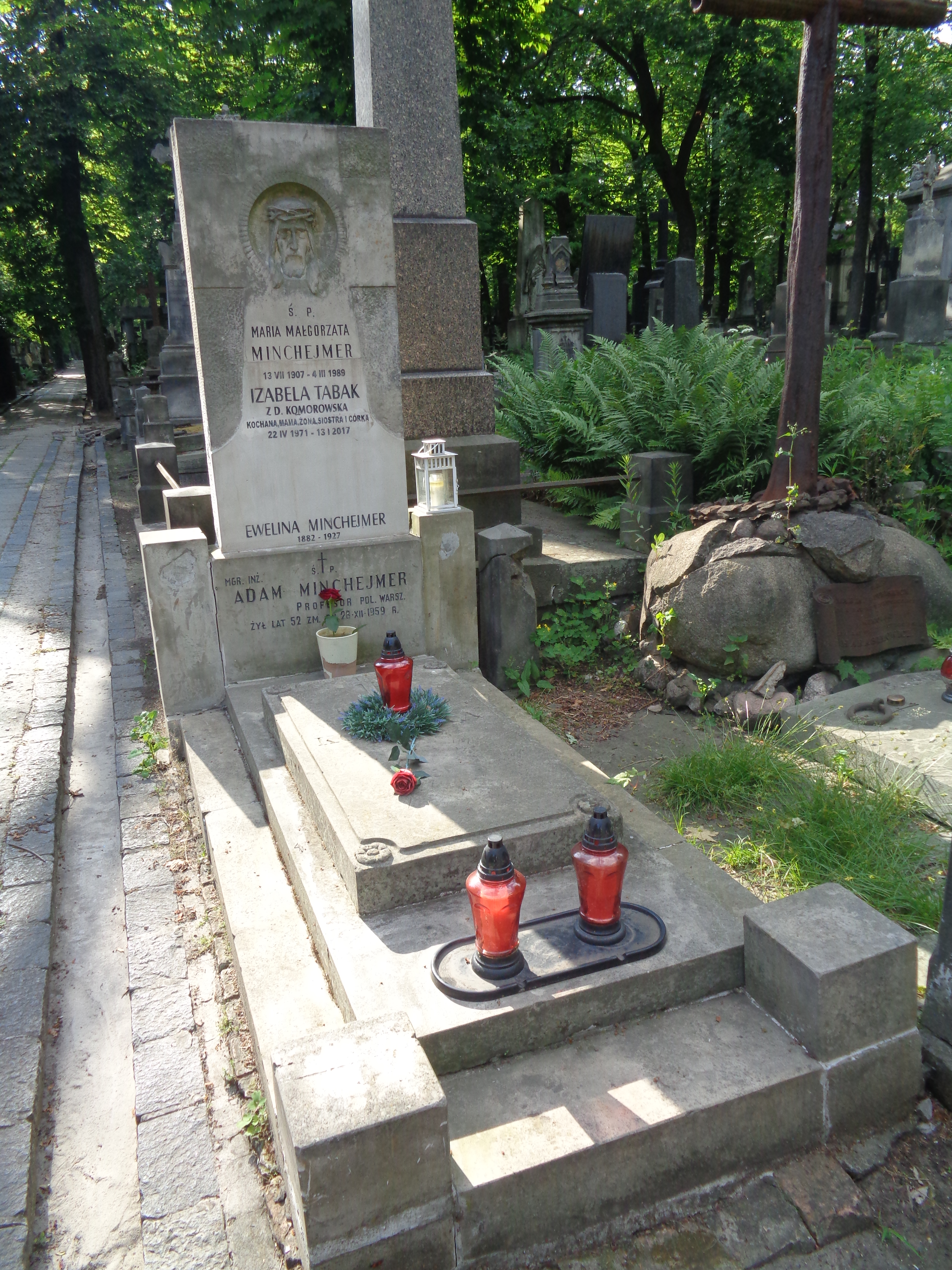 Grób Adama Ryszarda Minchejmera na Cmentarzu Powązkowskim